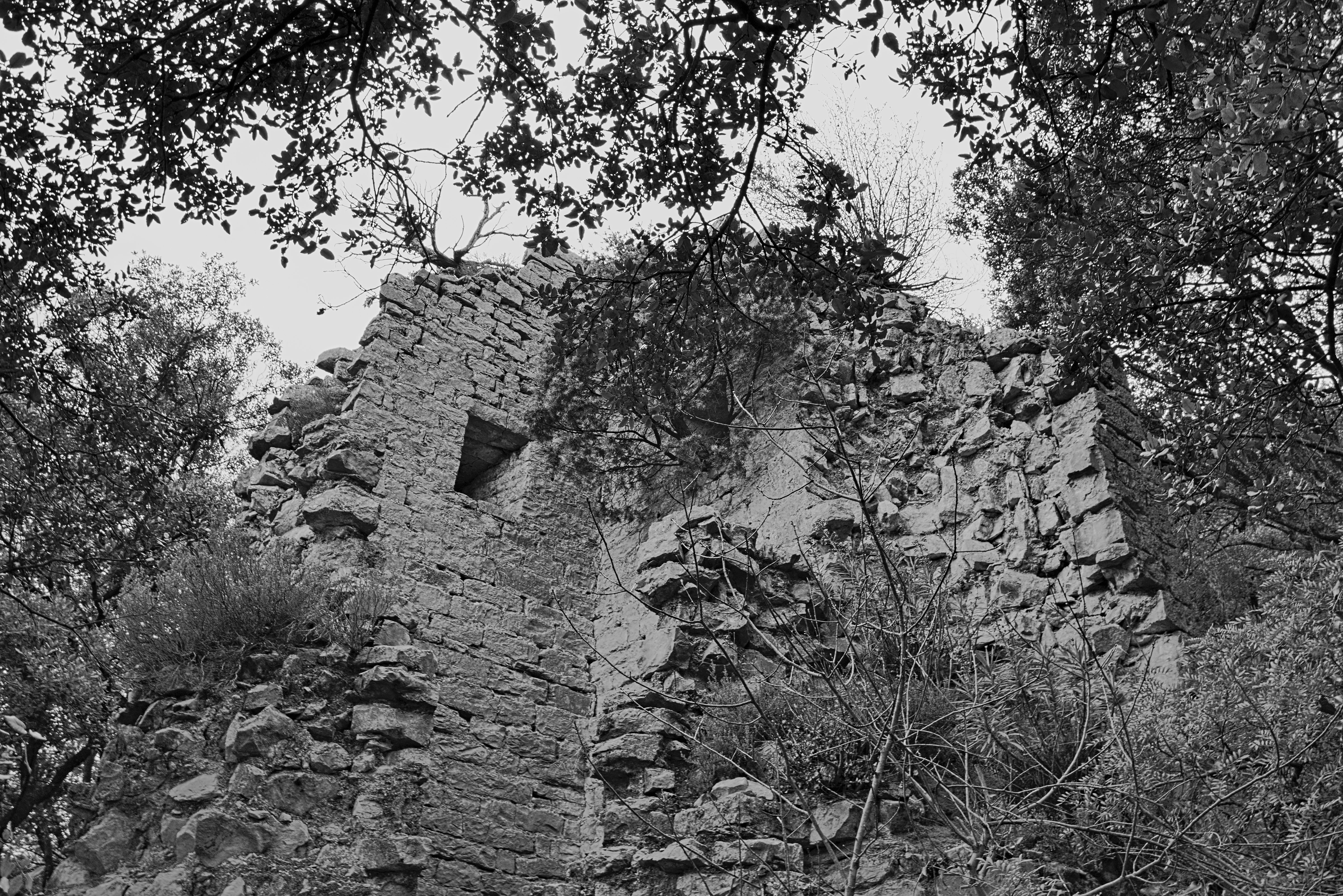 Entre Quissac et Sauve dans le massif de Coutach. Tour de guet dont la construction remonterait au début du XIIIème siècle.